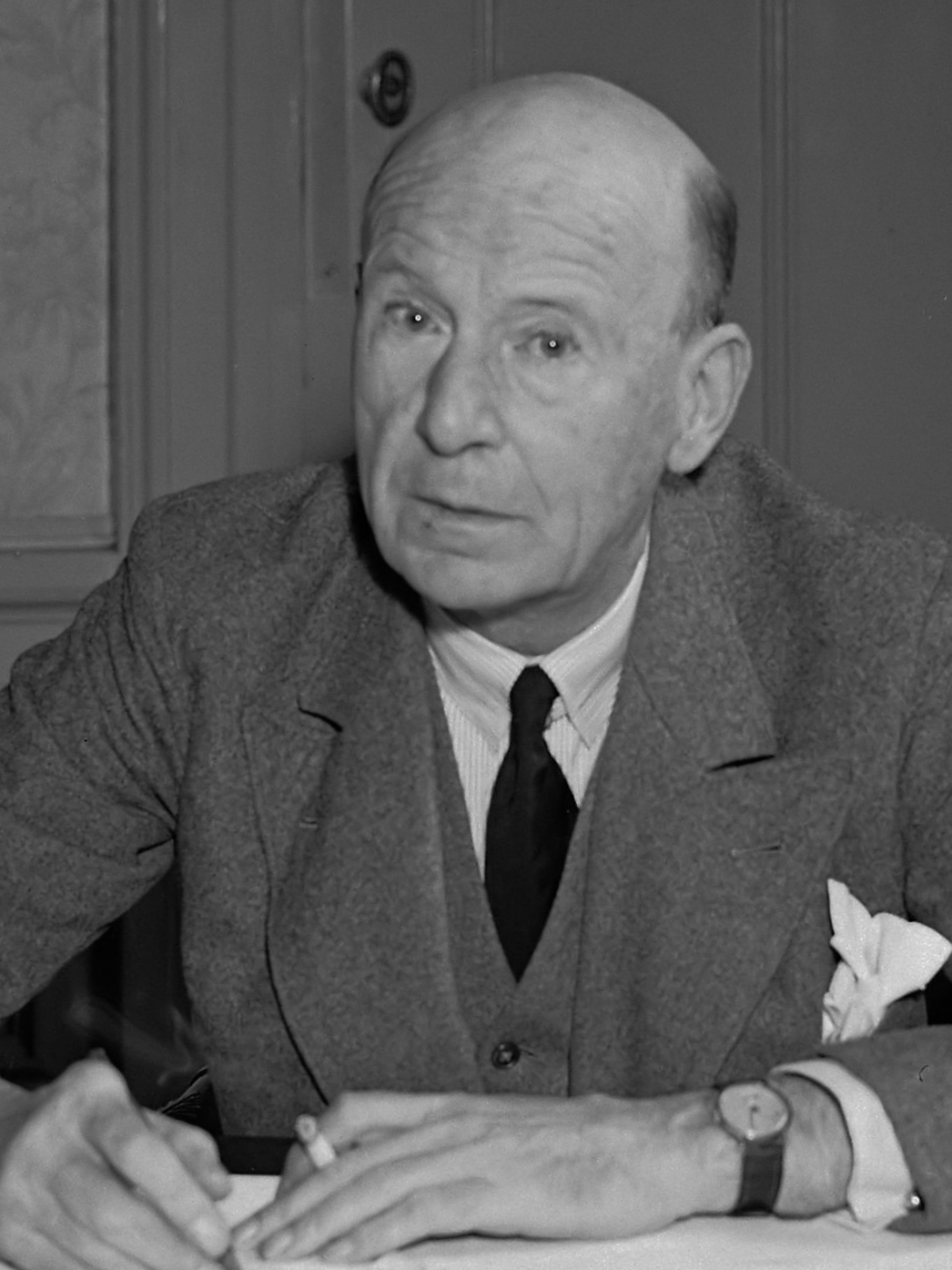 Jhr. Mr. A.M. Snouck Hurgronje 1945